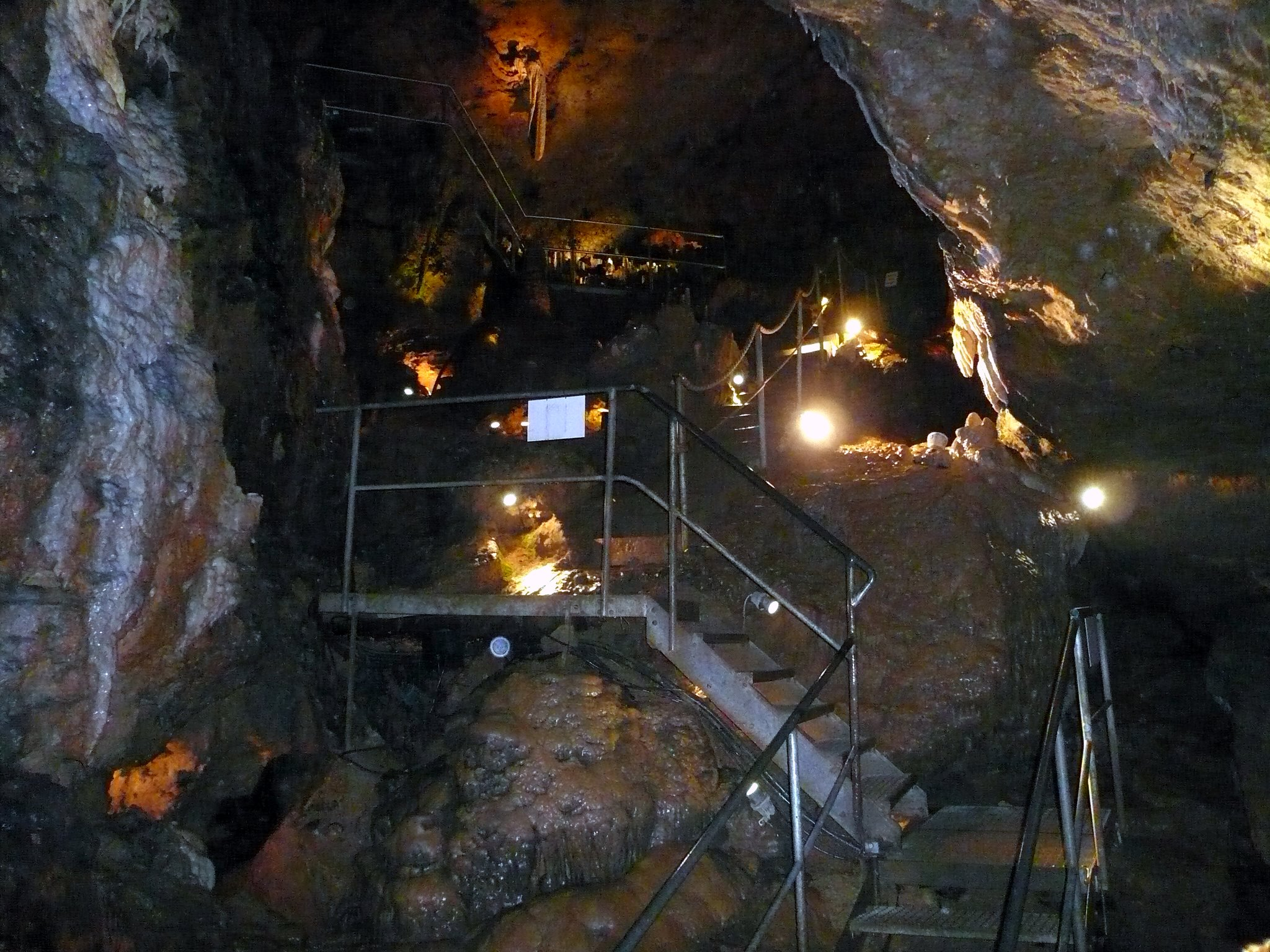 Sophienhöhle, Treppenanlage